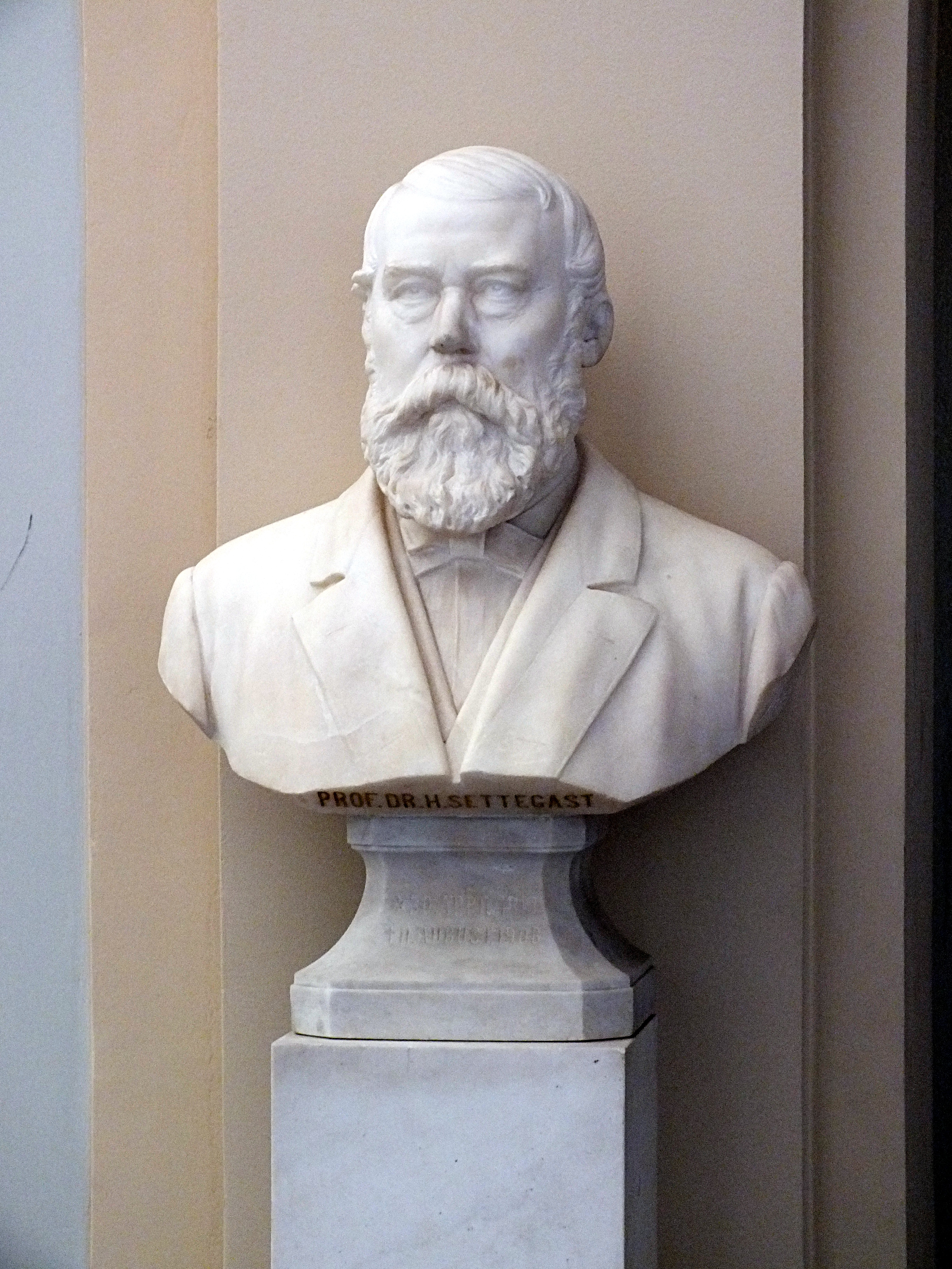 Berlin-Mitte, Büste für Settegast an der HU Berlin, Invalidenstraße